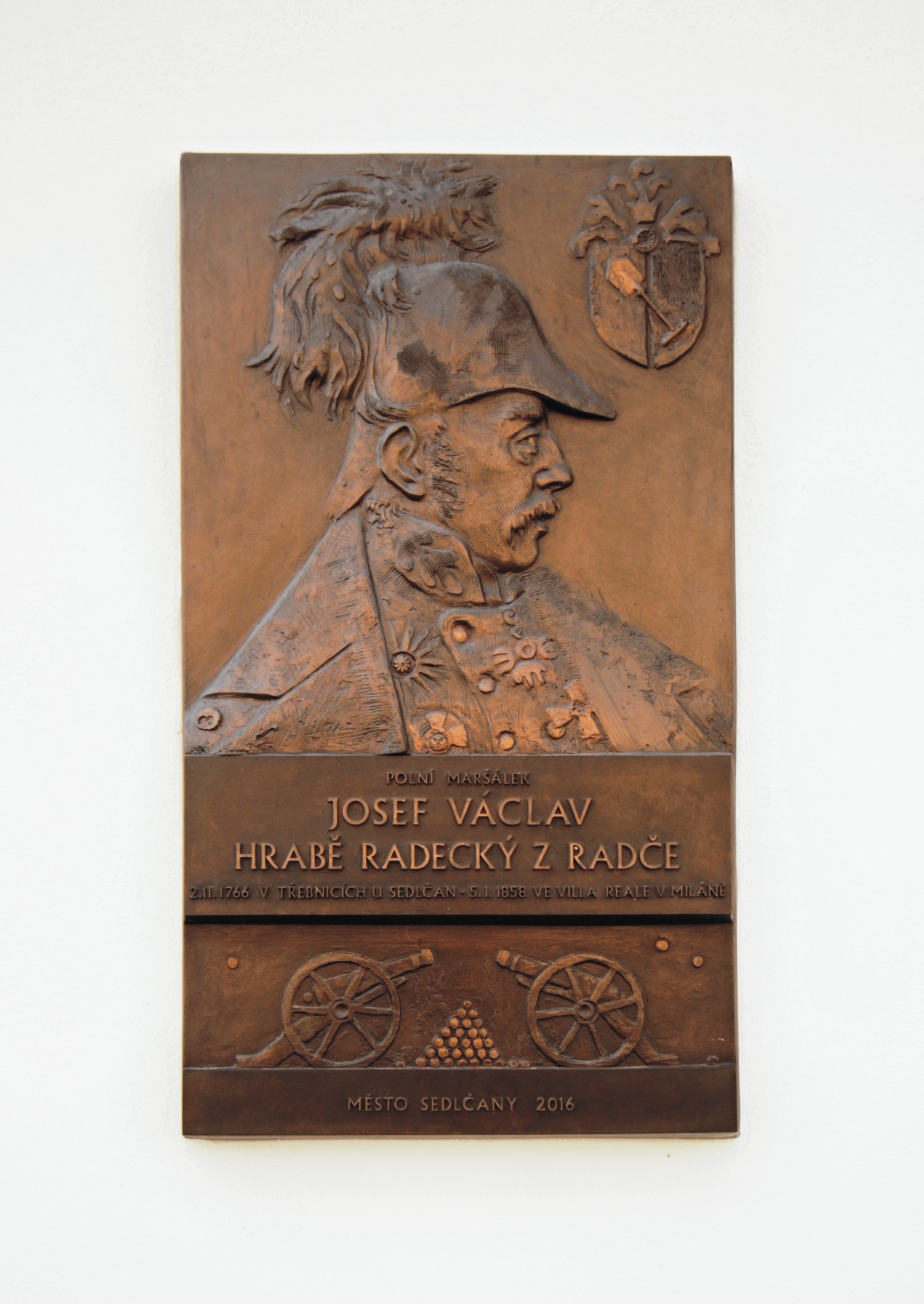 Sedlčany, Tyršova ulice, pamětní deska maršála Radeckého z Radče